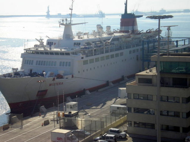 Melilla en abril de 2014